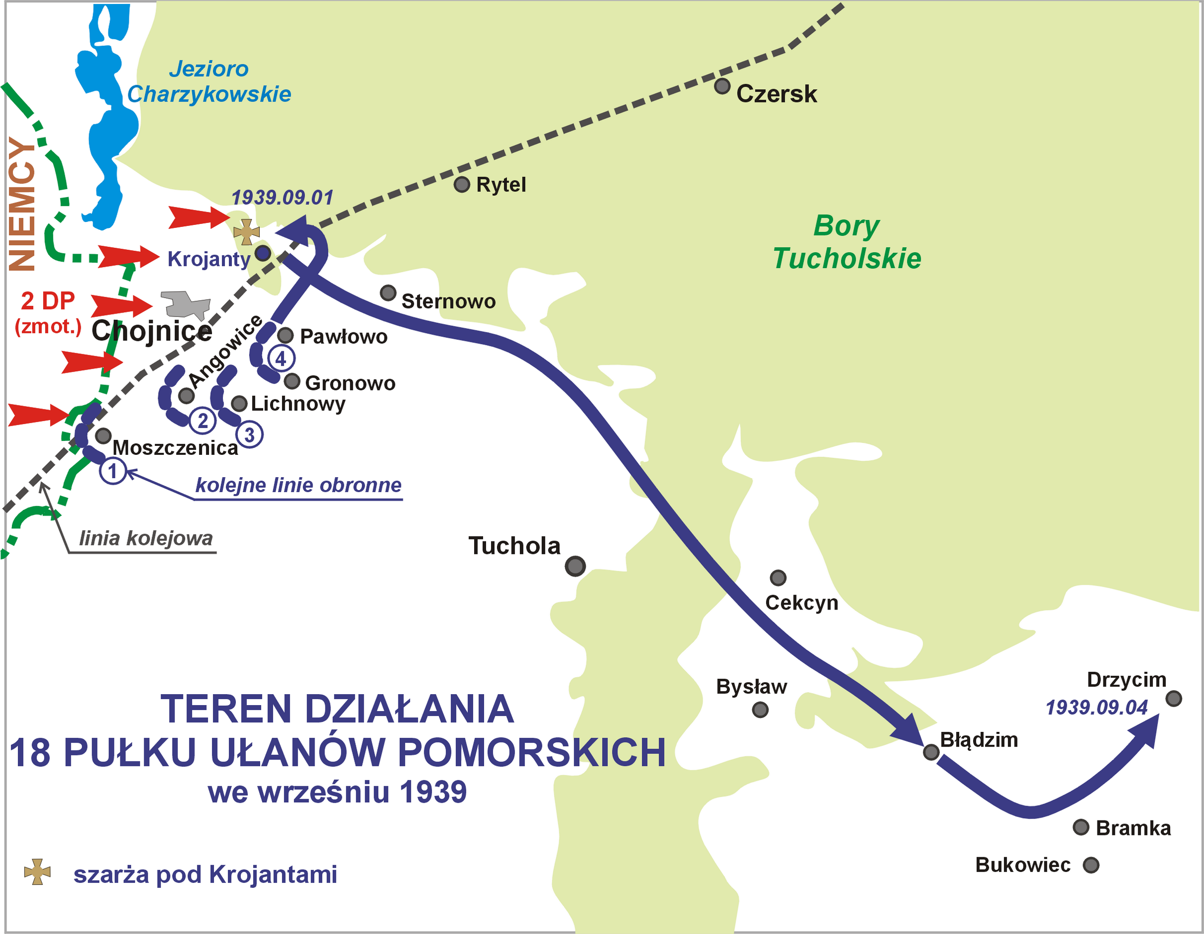 Teren działania 18 Pułku Ułanów Pomorskich we wrześniu 1939 r